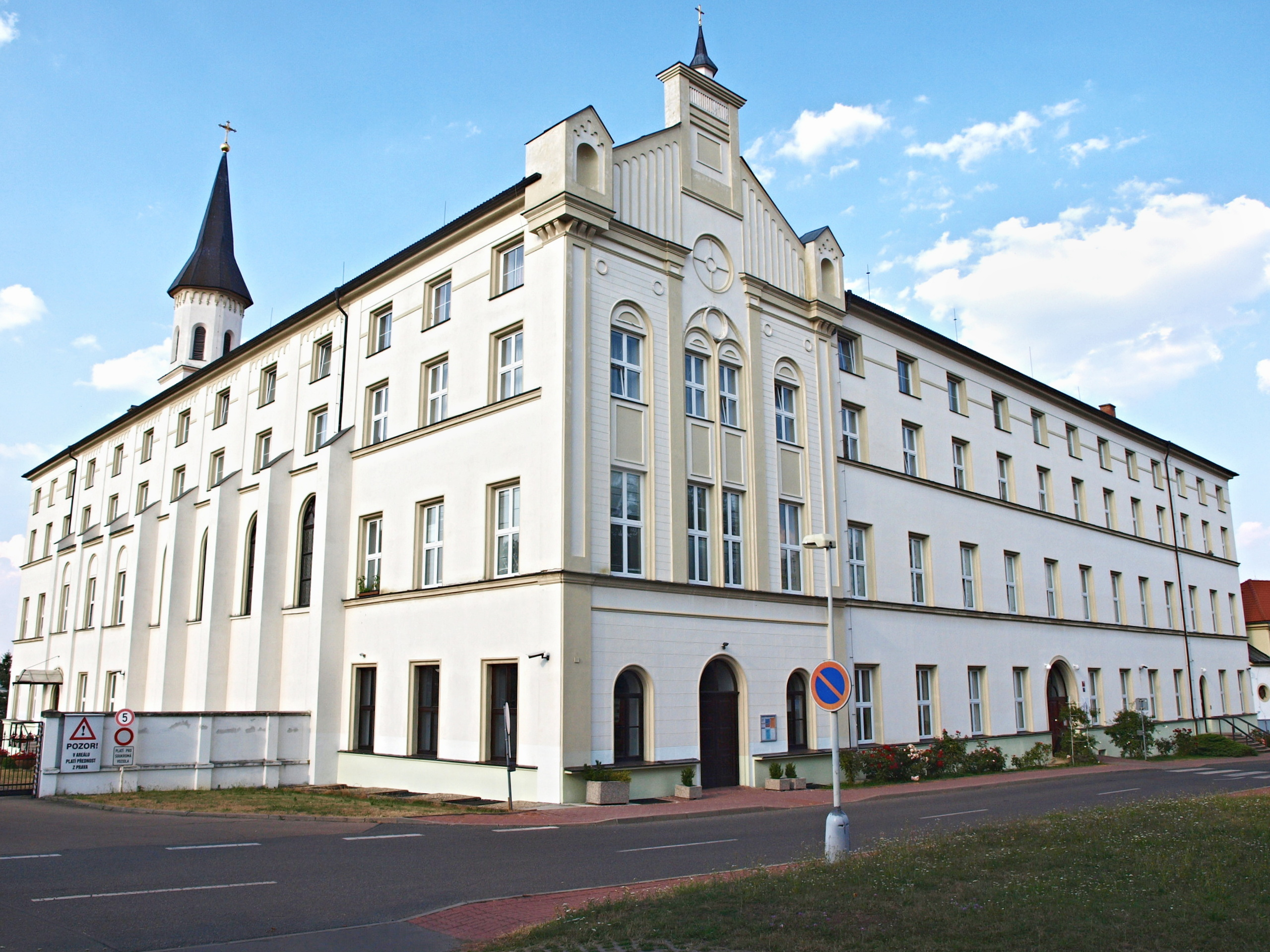 Klášter sester boromejek v Praze-Řepích